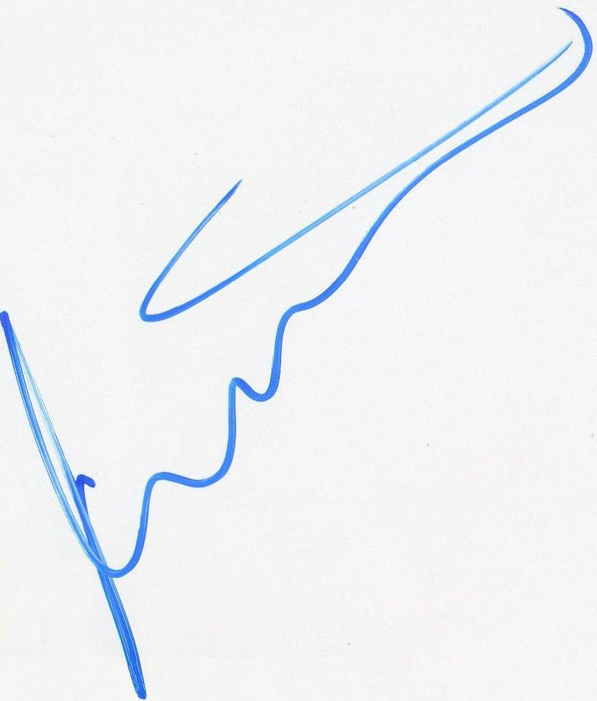 Autogramm von Timo Scheider